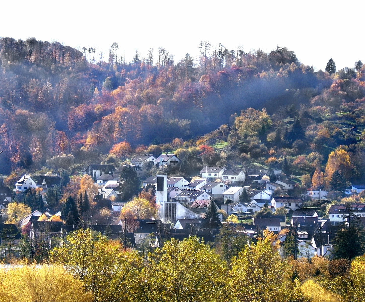 Remshalden; Blick von der Nordseite des Tales auf die katholische Kirche St. Elisabeth in Geradstetten-Süd